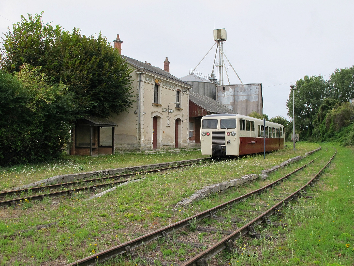 L'autorail Verney X 211 en gare de Luçay-le-Mâle (Indre) le 23 août 2015.